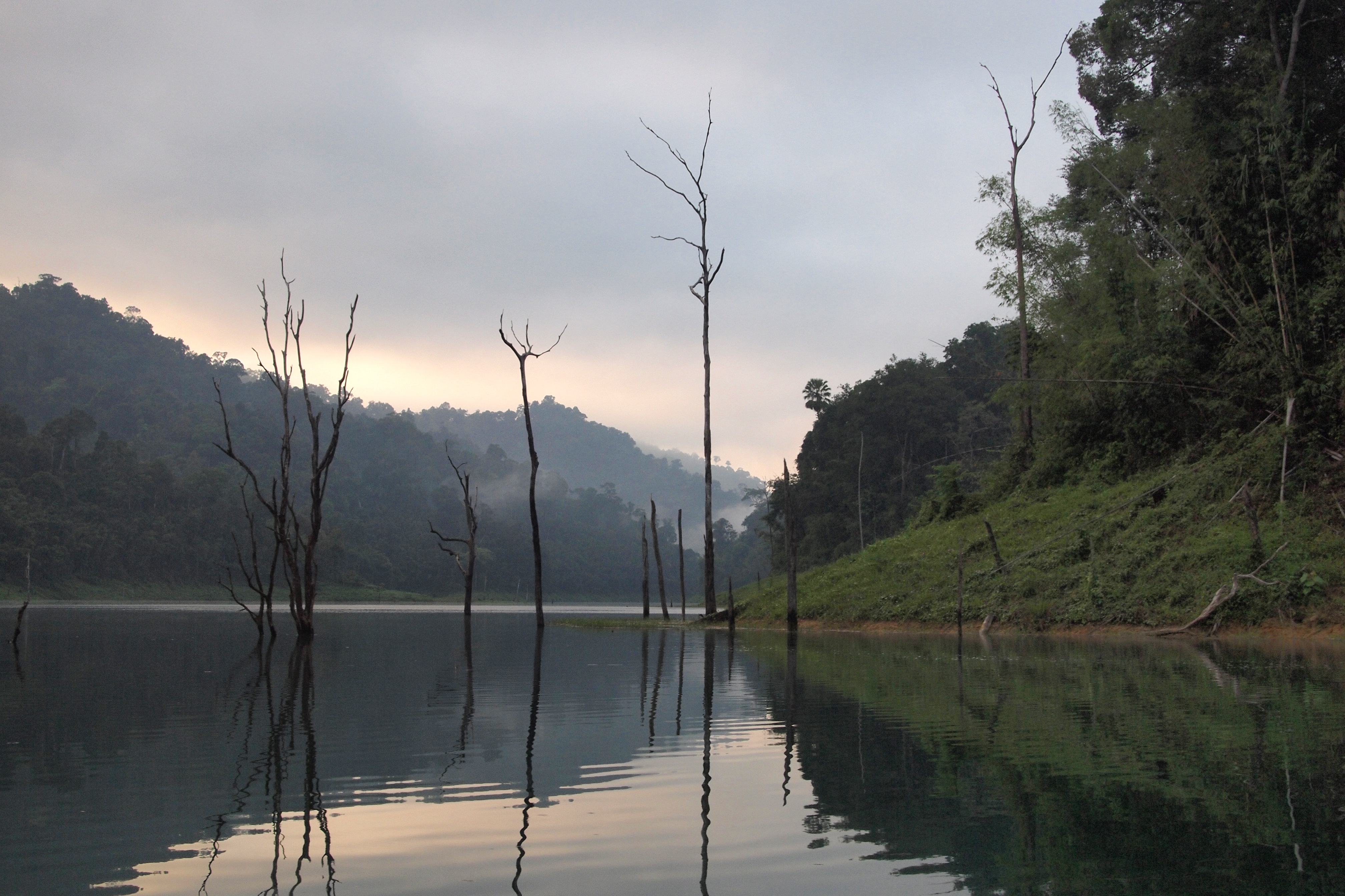 อุทยานแห่งชาติเขาสก